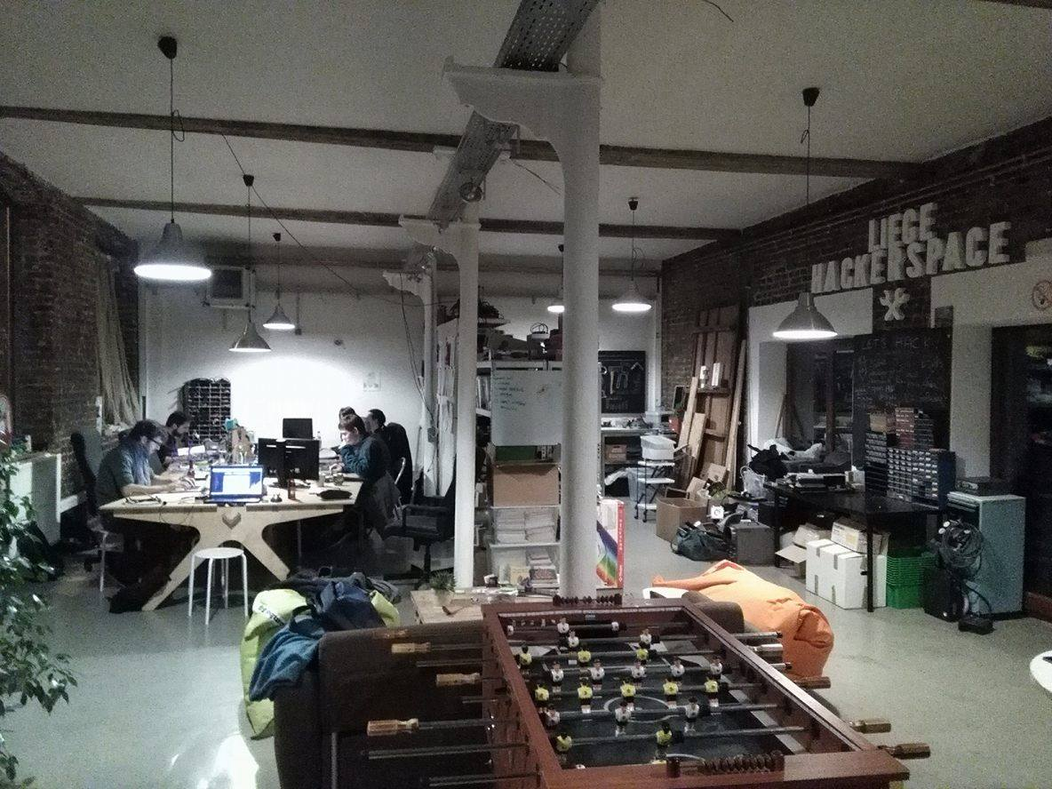 HackerspaceLGHS